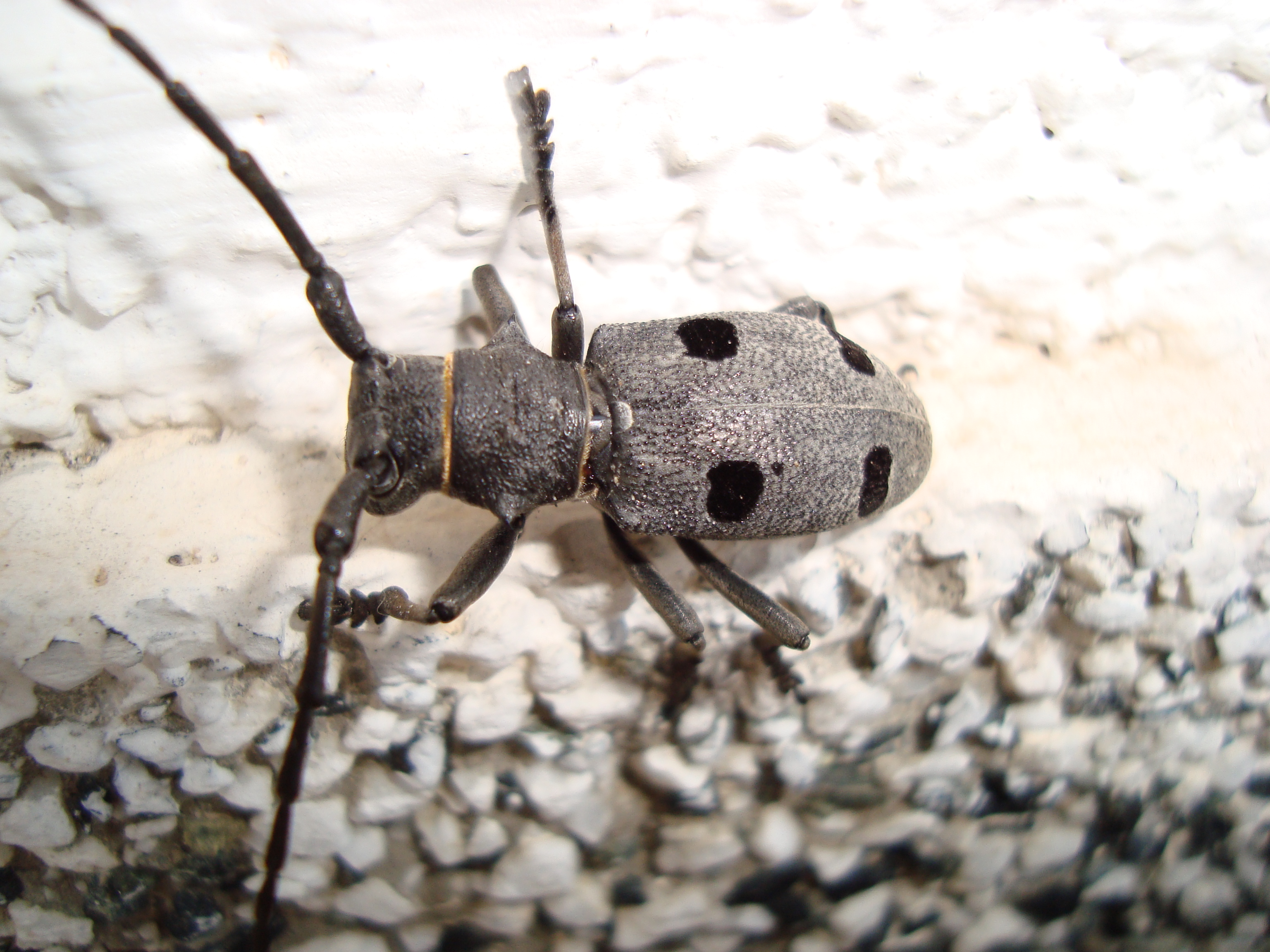 Еленче од Полог, Македонија.